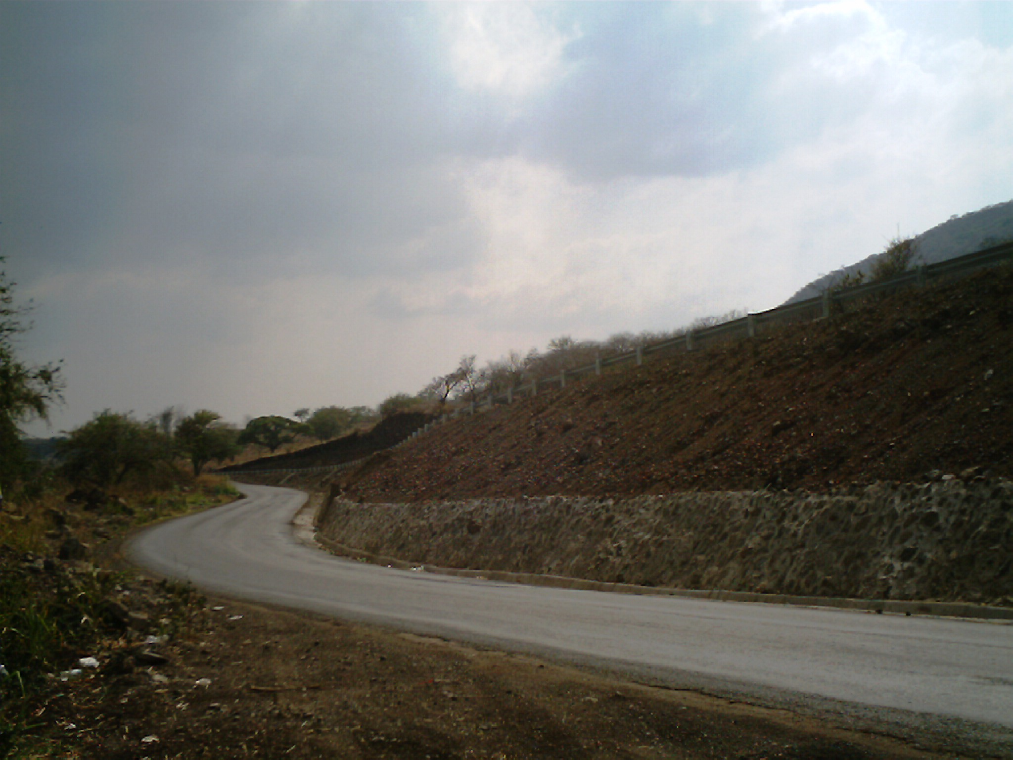 Carretera estatal número 71 en su tramo en Atotonilco el Alto.